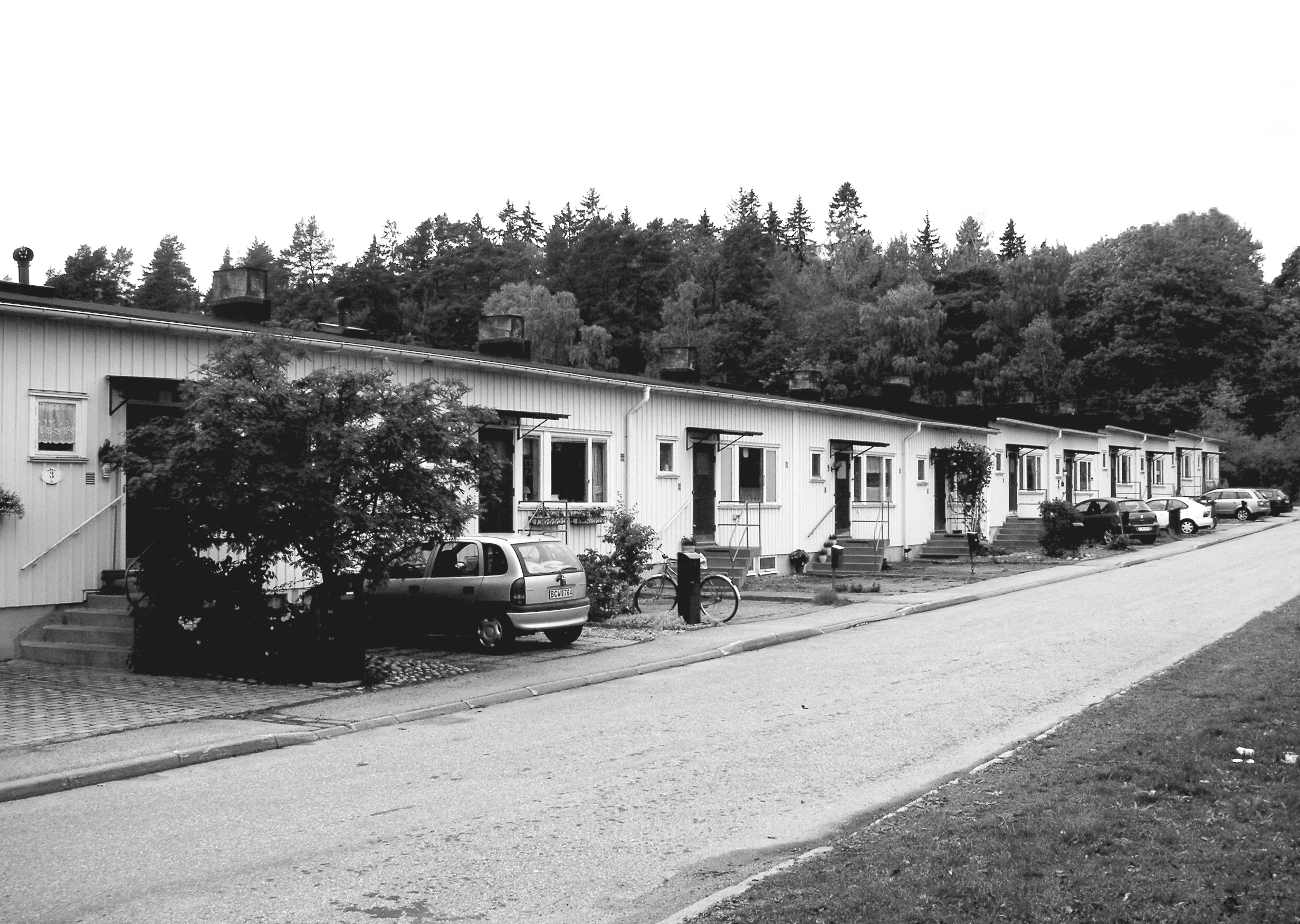 Uno Åhréns radhusområde i Norra Ängby 1931 (HÄLSINGERUNAN 1)